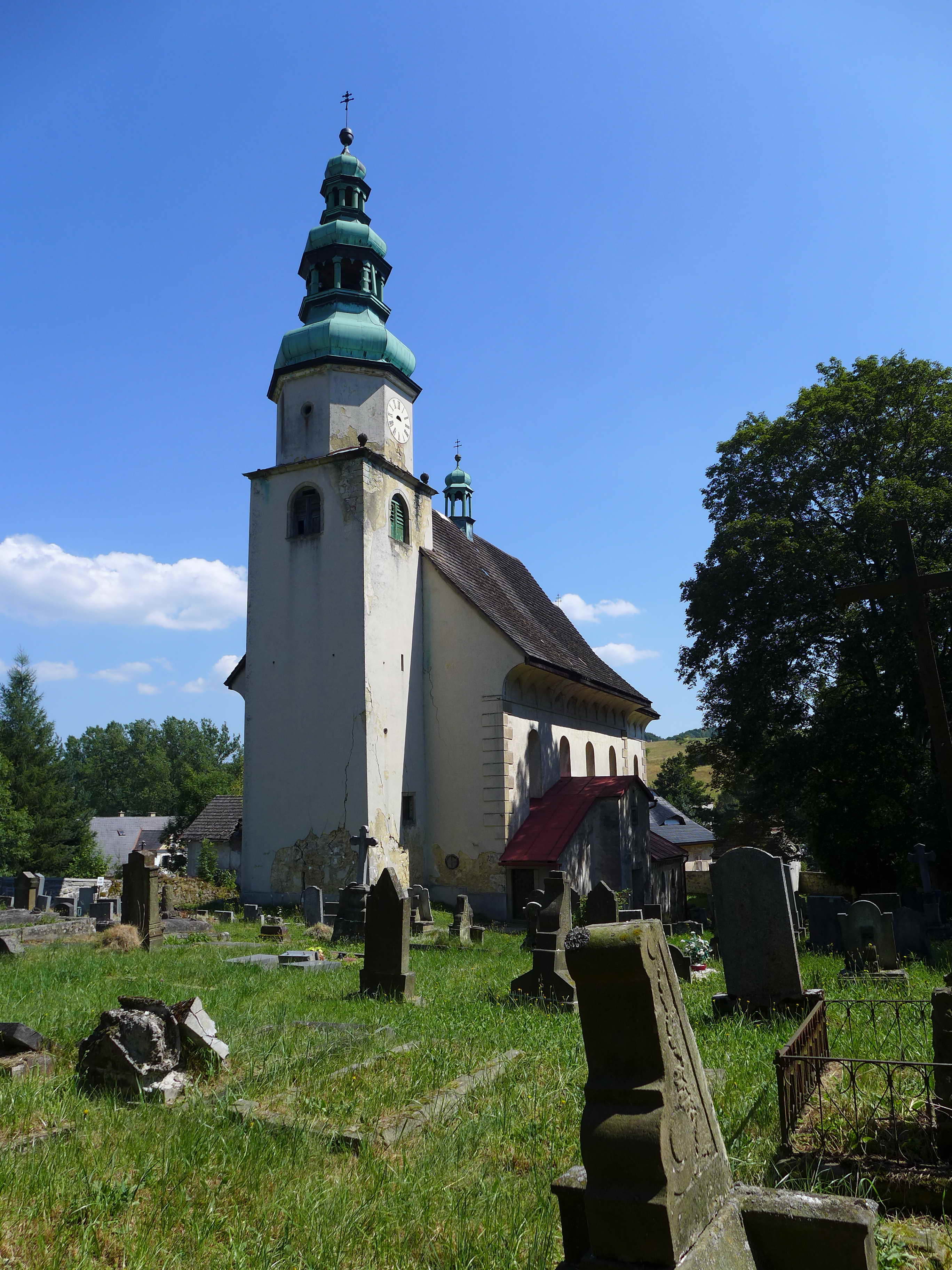 Kostel Nejsvětější Trojice, Zdoňov.